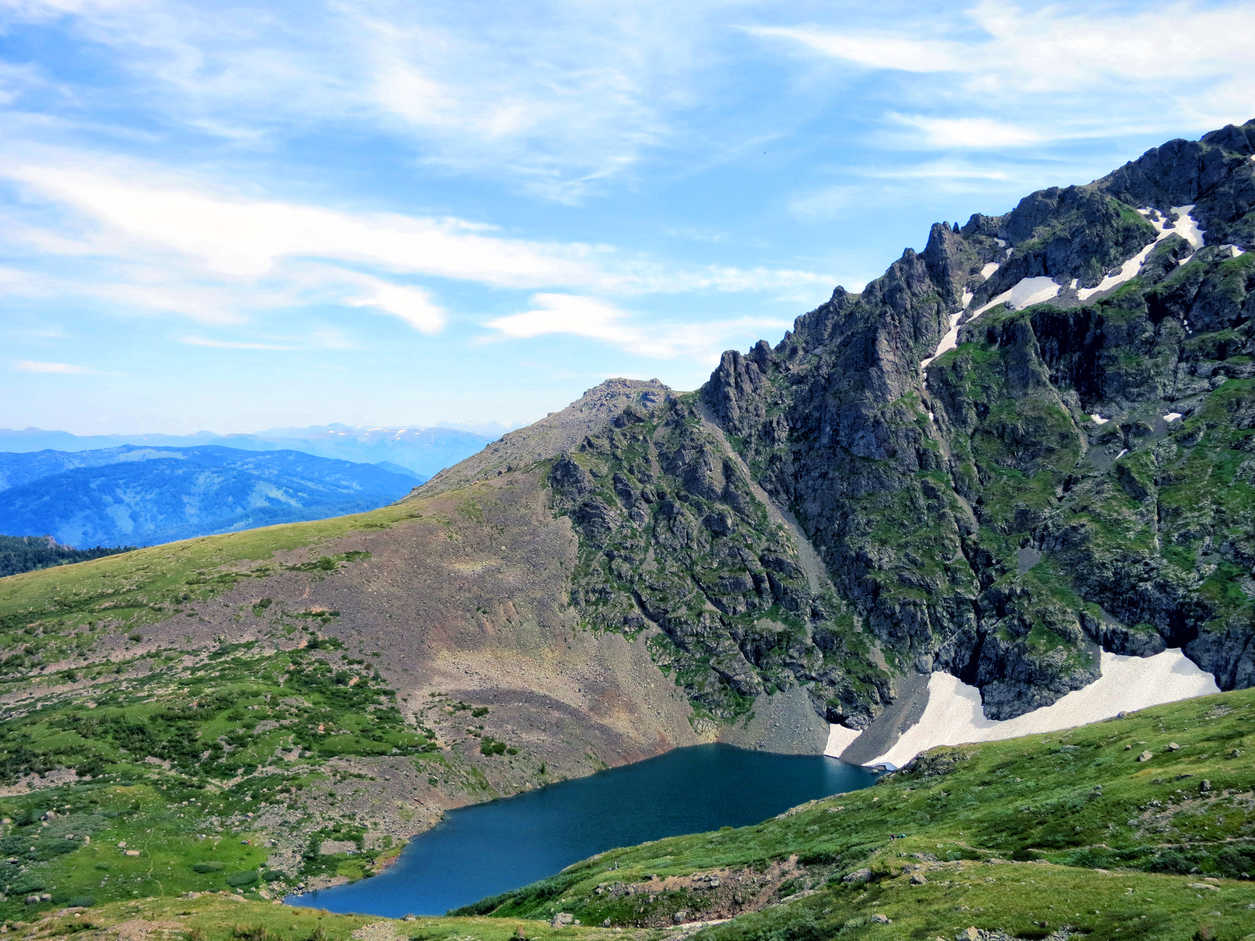 Катунский заповедник: Усть-Коксинский район, Алтай This image is related to the protected area of Russia number 0400042